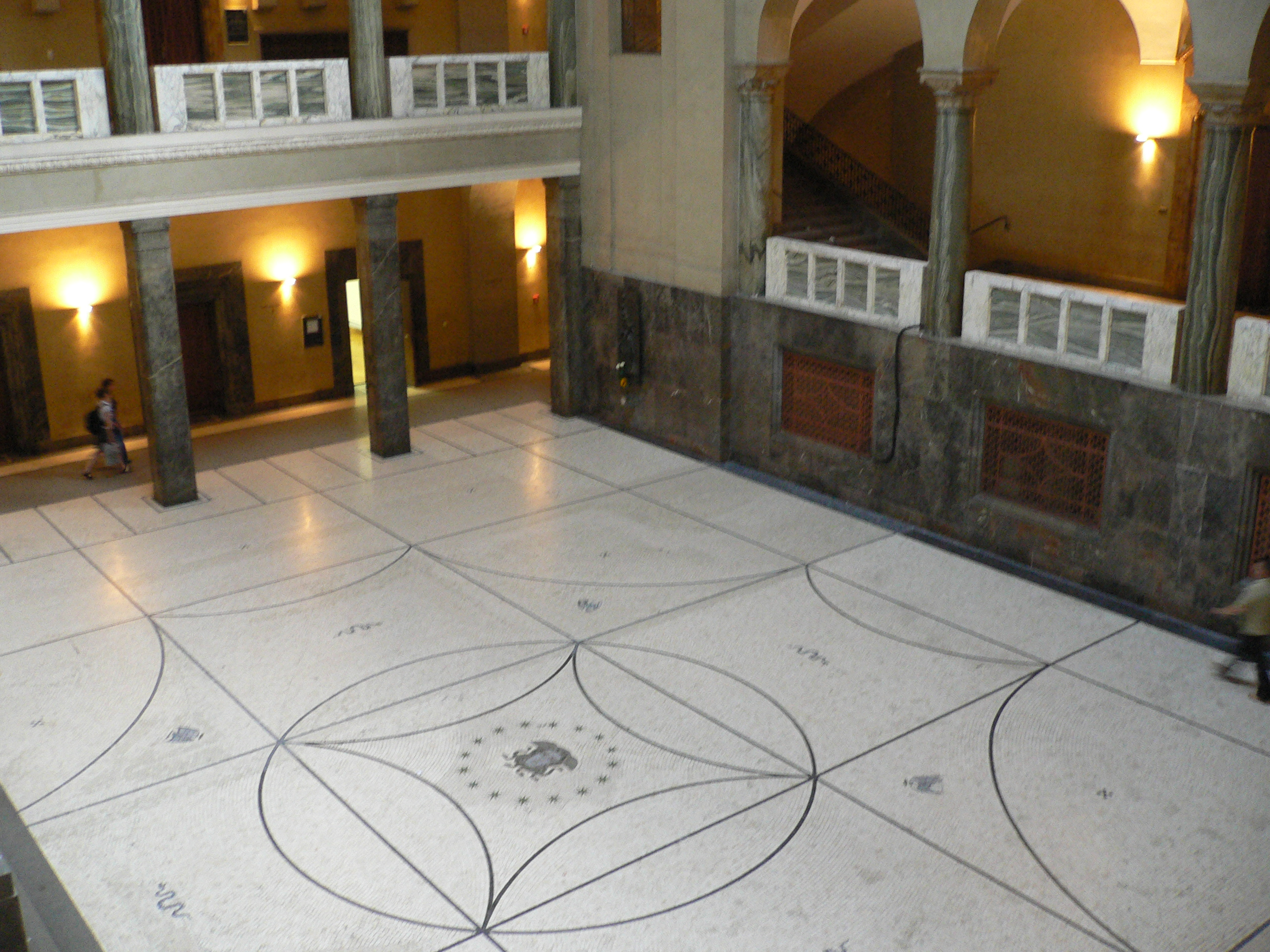 Ludwig-Maximilians-Universität - Hauptgebäude - Raum A086 (Lichthof)